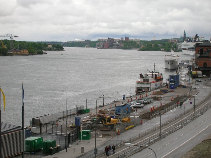 Saltsjön, Stockholm, Sweden.